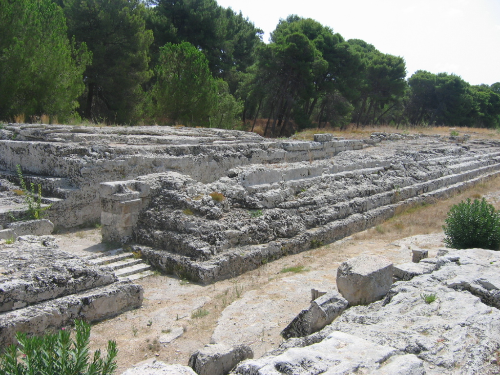 Autel de Hiéron II, Syracuse, Italy, Sicilia. Author: Urban. Body: Canon Powershot A80. Date: August, 2005.